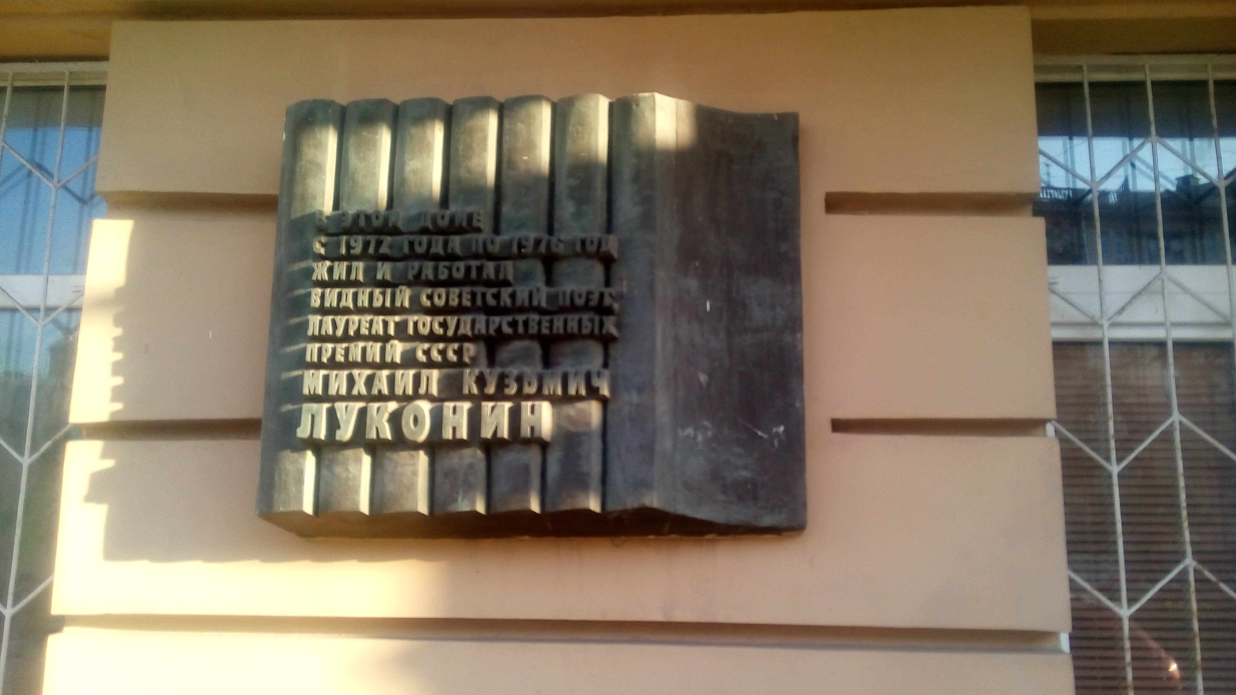 Мемориальная доска Михаилу Кузьмичу Луконину